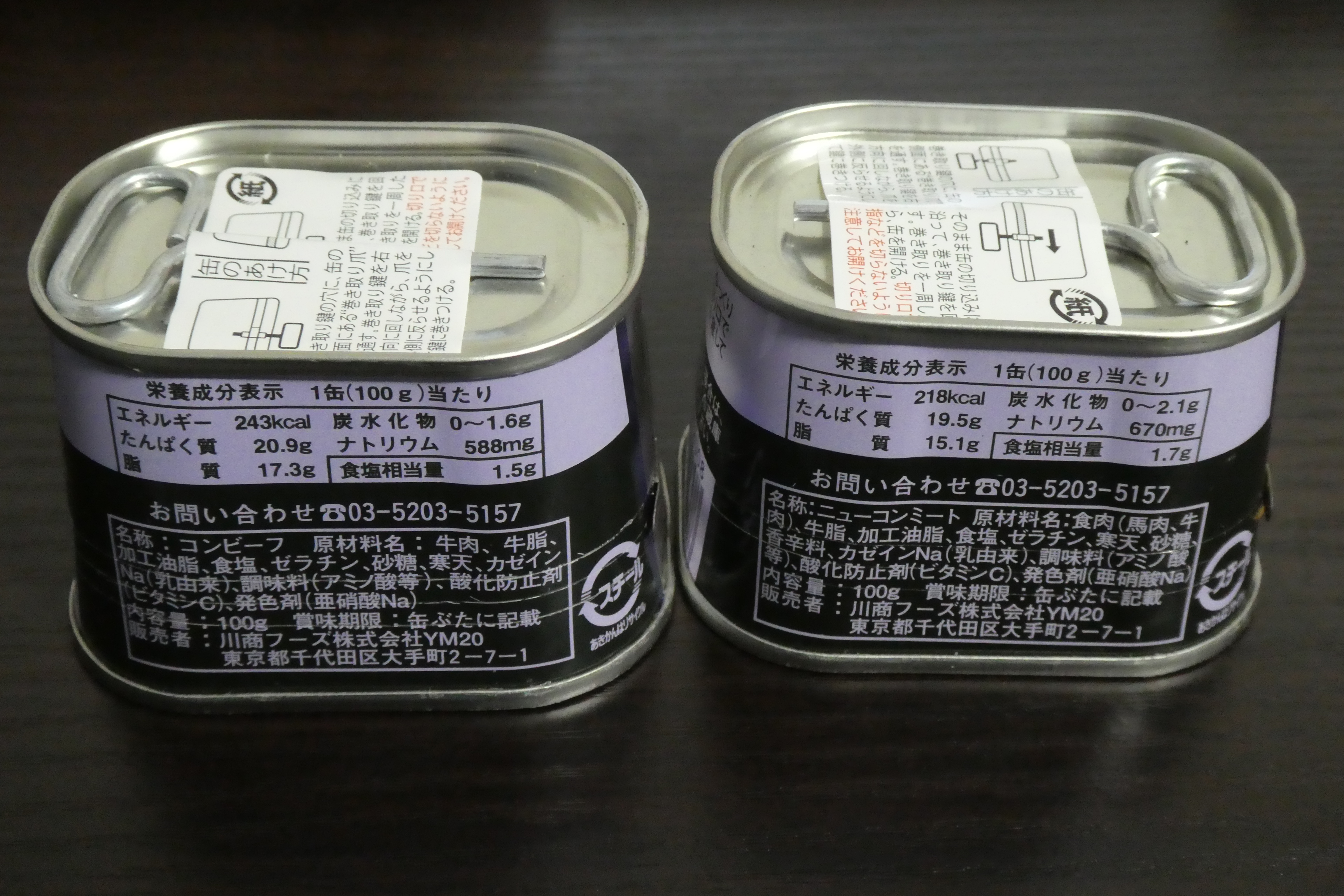 ノザキのコンビーフとニューコンミートの枕缶。表面には商標があるため、裏面の写真。